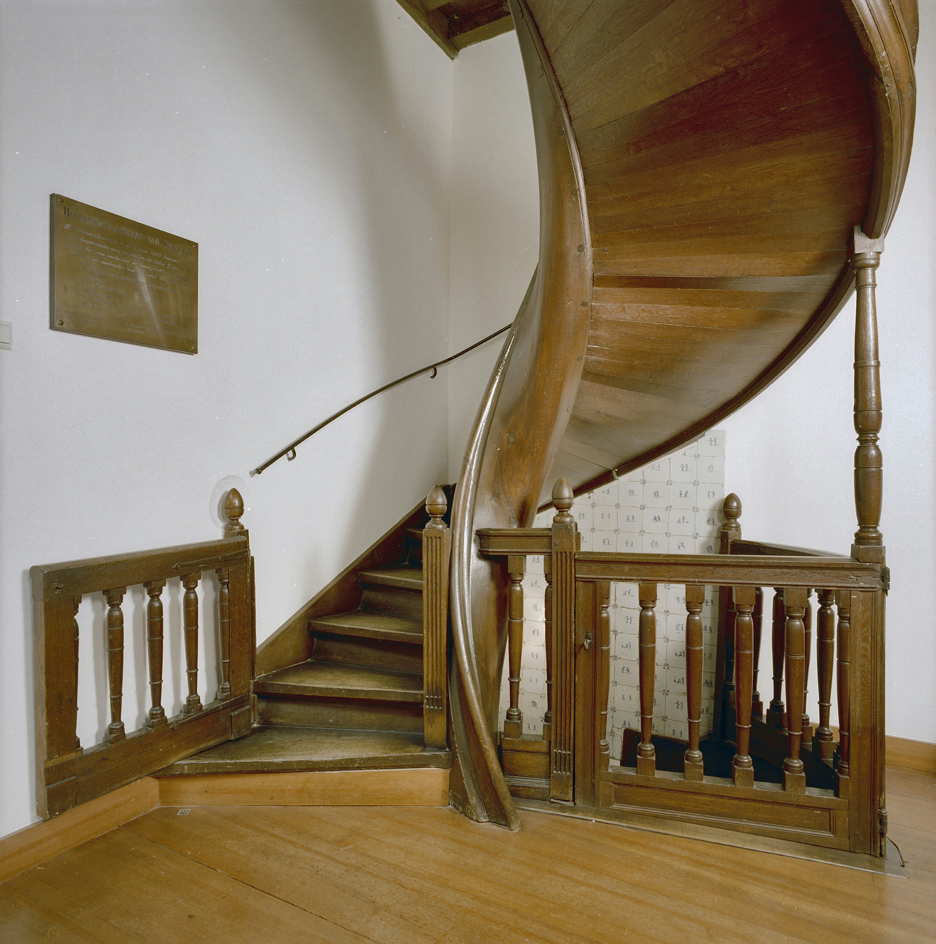 Gemeenlandshuis van Delfland: INTERIEUR, TRAP, DETAIL